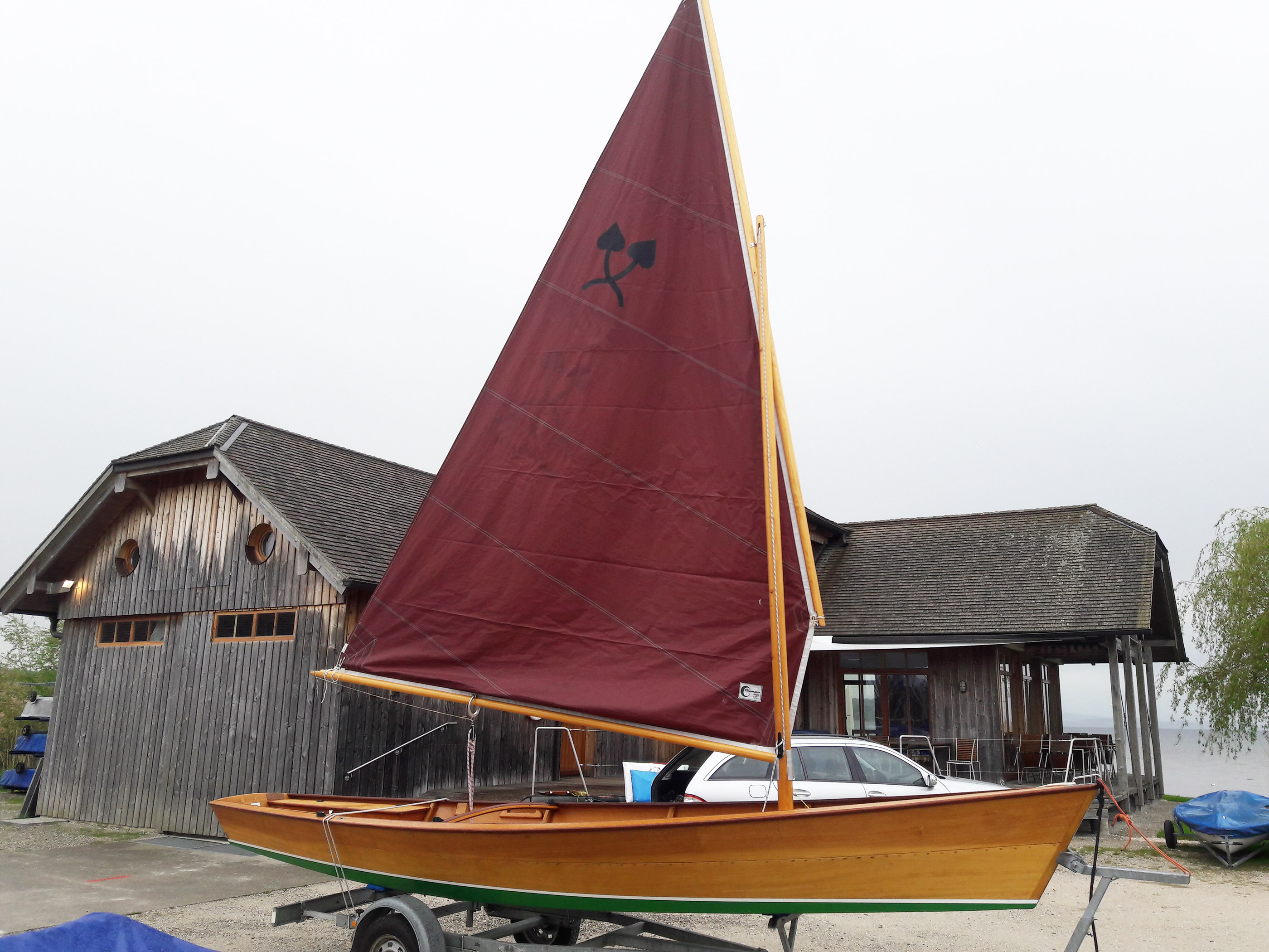 Seitenansicht einer Chiemseeplätte vor dem Clubhaus des Seebrucker Regatta Verein